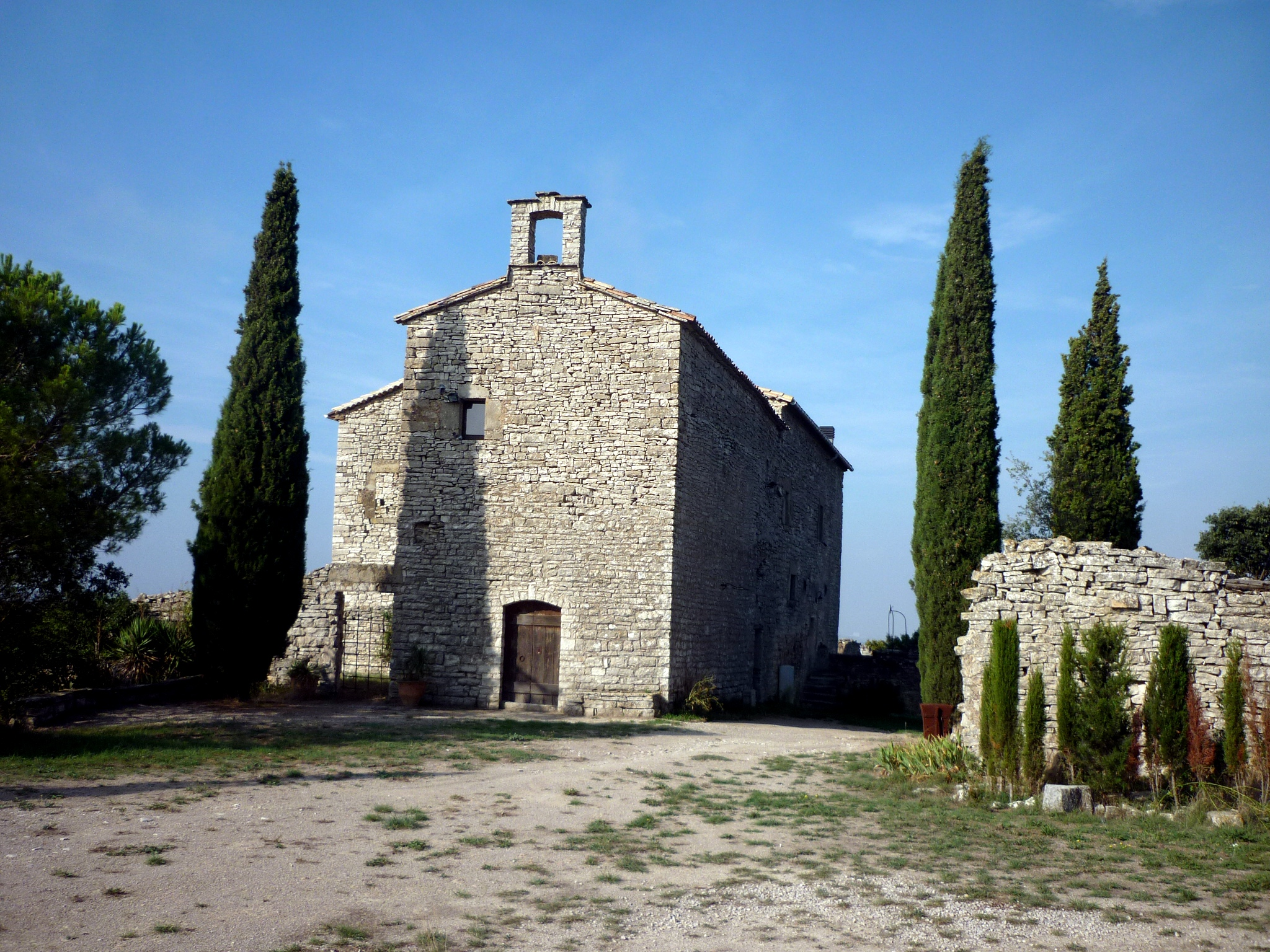 Nucli de Malacara (Estaràs): església de Santa Maria